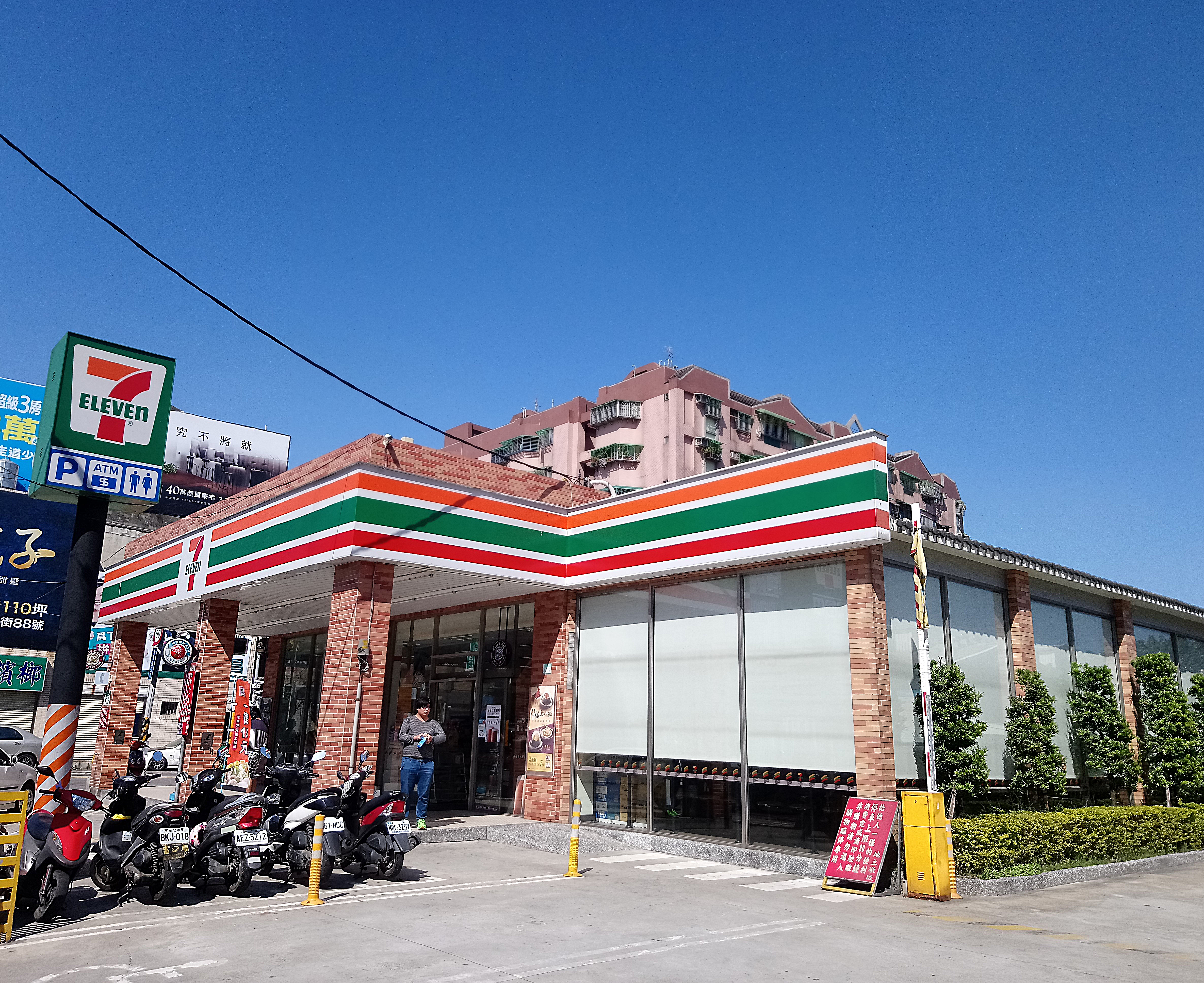 統一超商長虹門市,新北市鶯歌區鳳鳴里